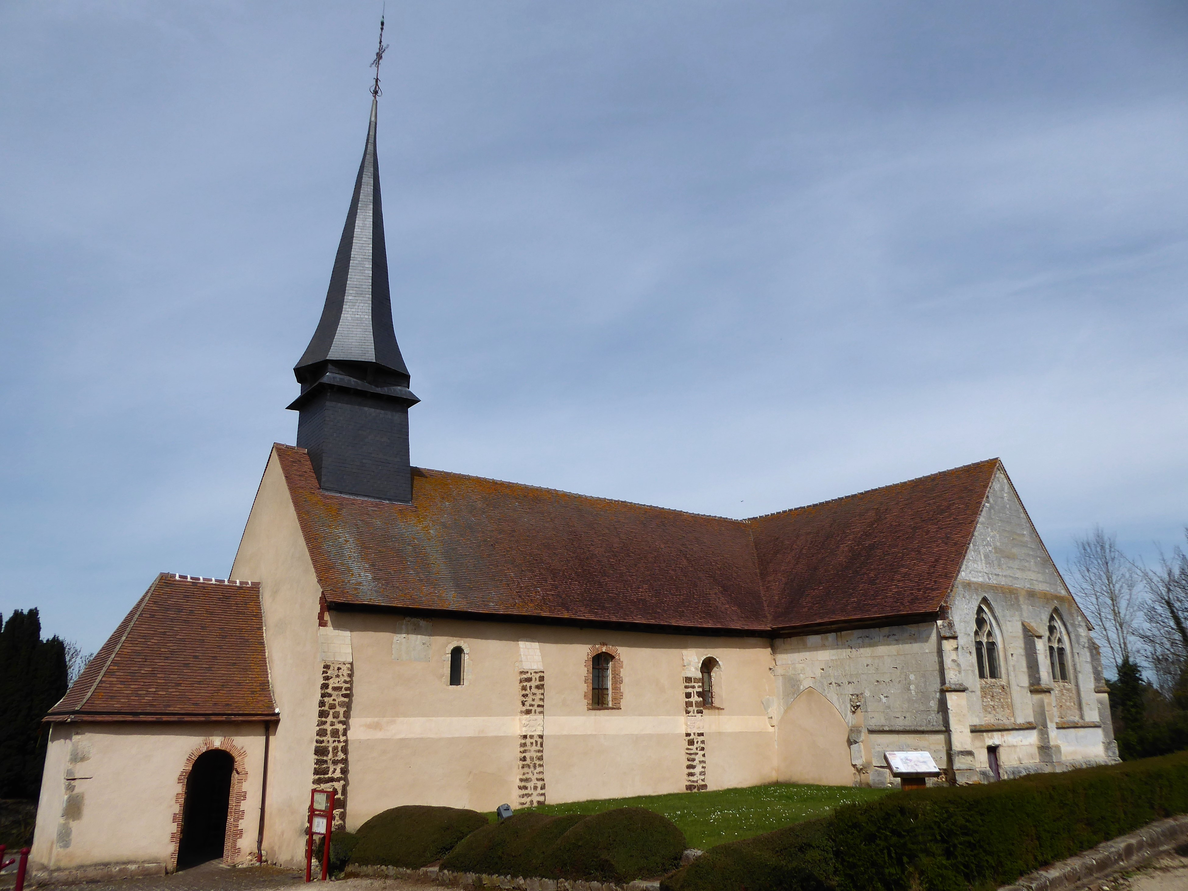 église Saint-Pierre, Dampierre-sur-Avre, Eure-et-Loir, France.